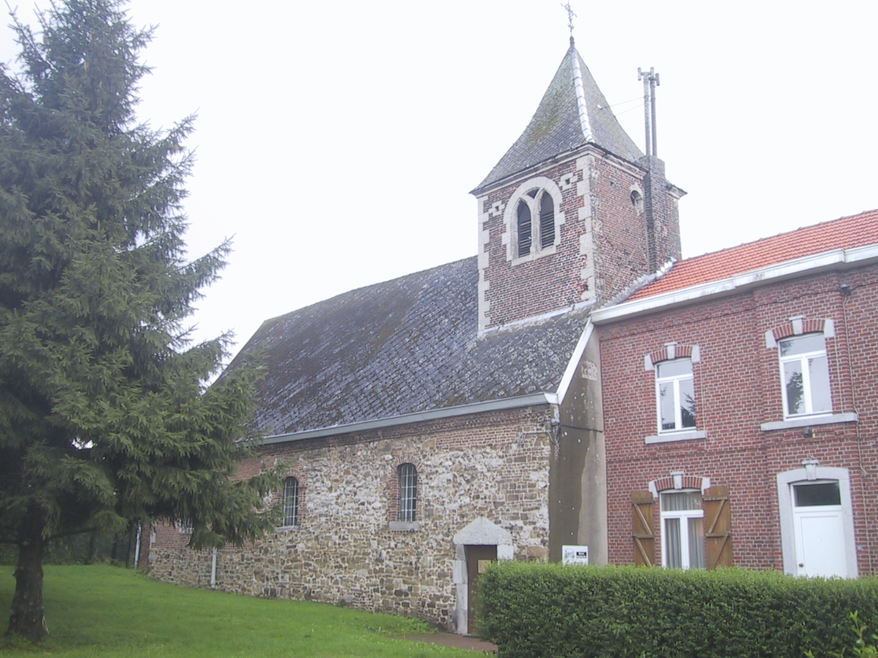 Chapelle de Hombroux à Alleur en Belgique